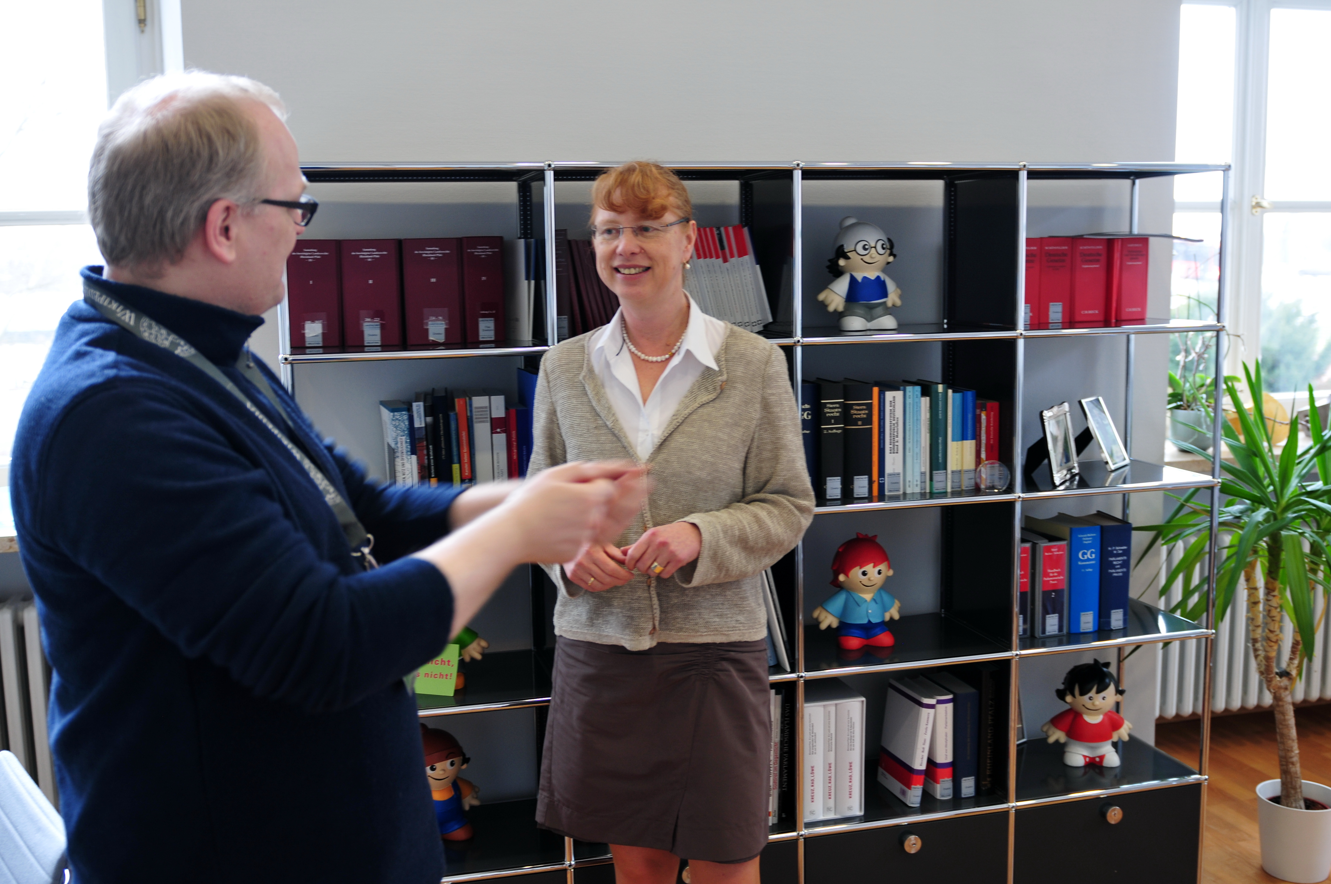 Landtag Rheinland-Pfalz in Mainz